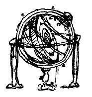 Schéma de l'automate planétaire de Huygens